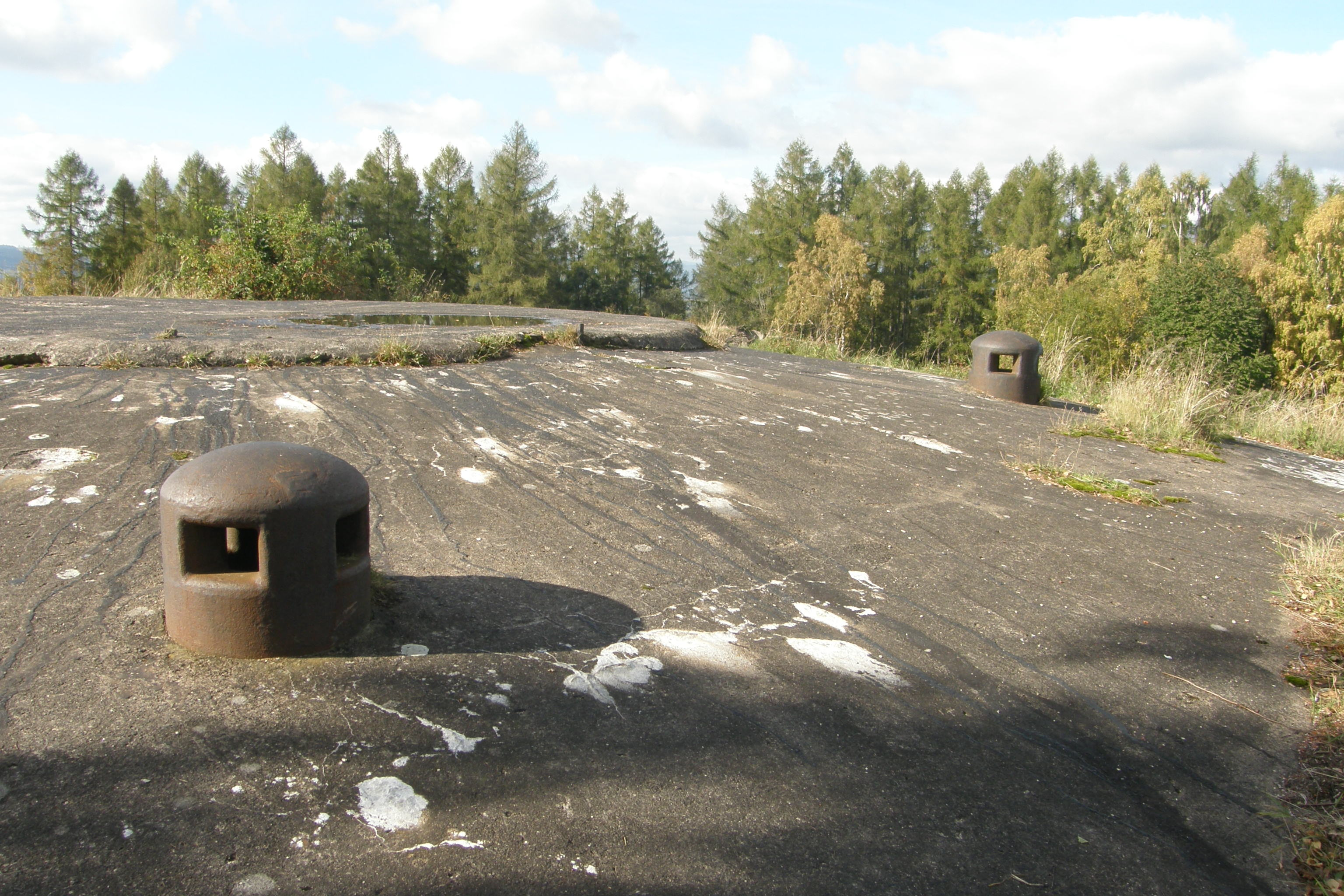 Dělostřelecká výsuvná a otočná věž K-Bg-S 12 Na kótě tvrze Hůrka